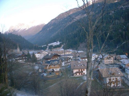 Panorama dell'abitato di Forno frazione di Moena Foto scattata nell'inverno del 2005